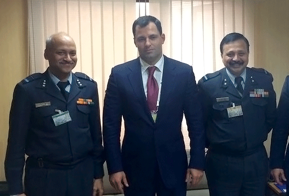 Максим Глущенко в штабе ВВС Индии на подписании контракта на ремонт самолетов АН-32